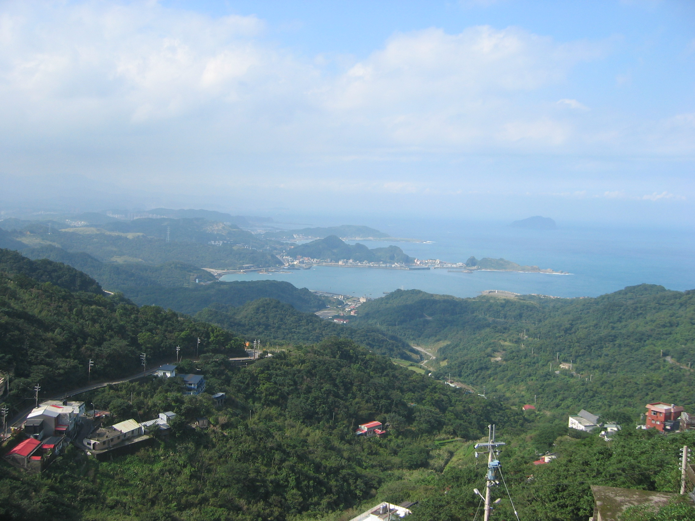 九份